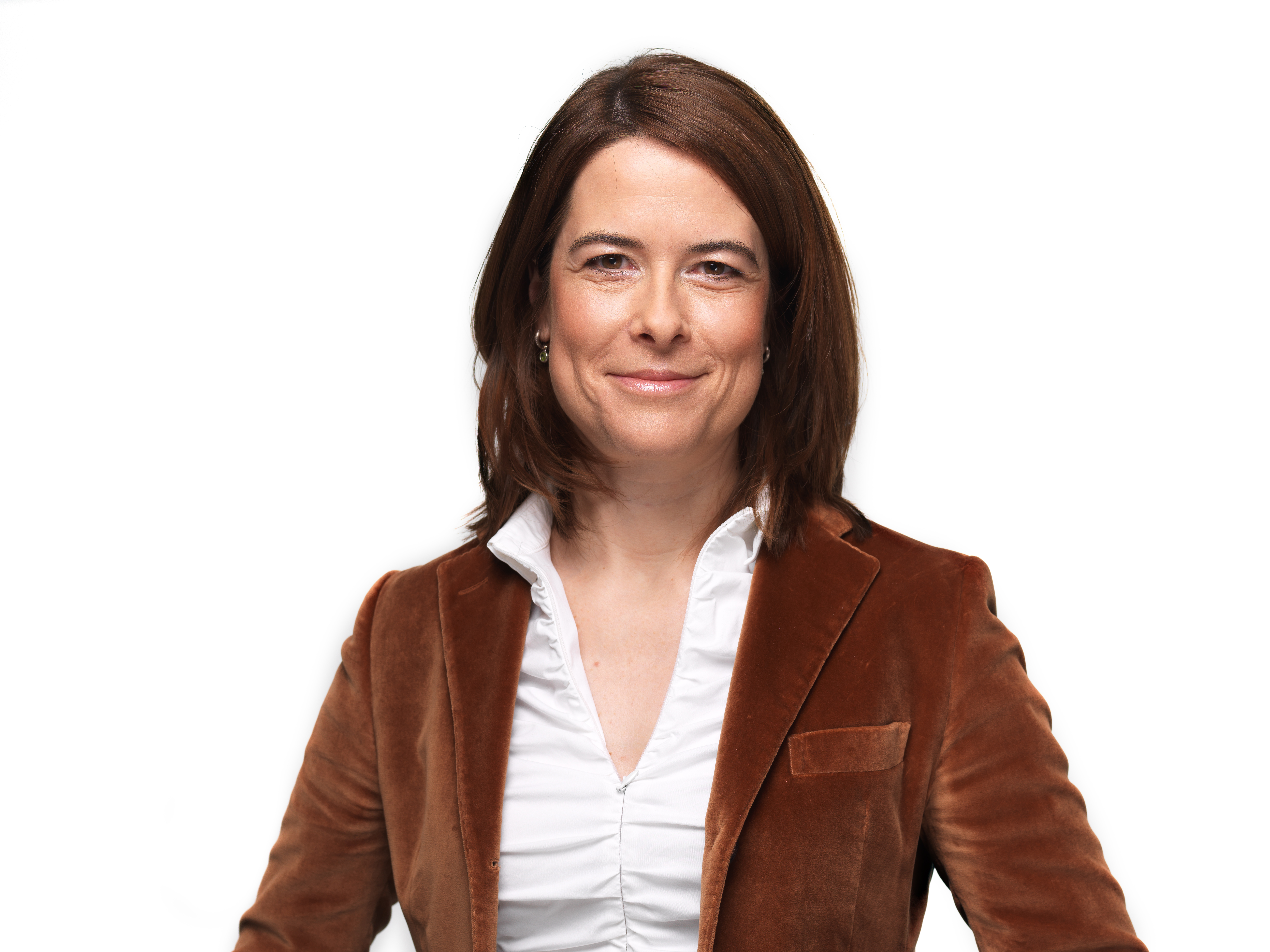 NR Petra Gössi, 2018